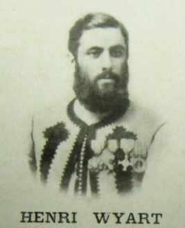 Henri Wyart (né le 12 octobre 1839 à Bouchain), chevalier de la Légion d'Honneur, capitaine des Zouaves pontificaux et Abbé Trappiste.